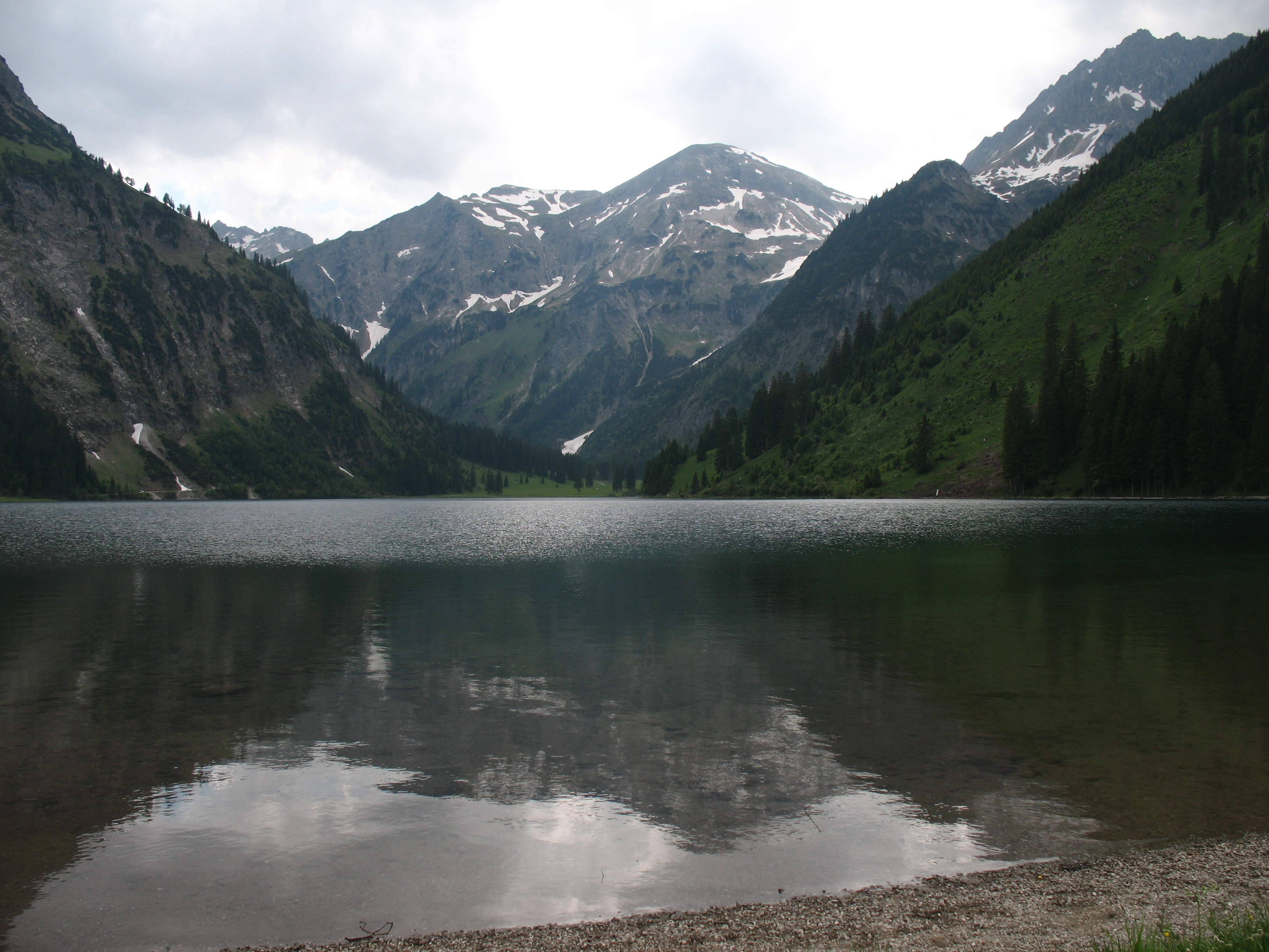 Blick über den Vilsalpsees auf Kälblespitze (2.135 m), Knappenkopf (2.071 m), Kugelhorn (2.126 m) und Rauhorn (2.241 m) (v.l.n.r.)